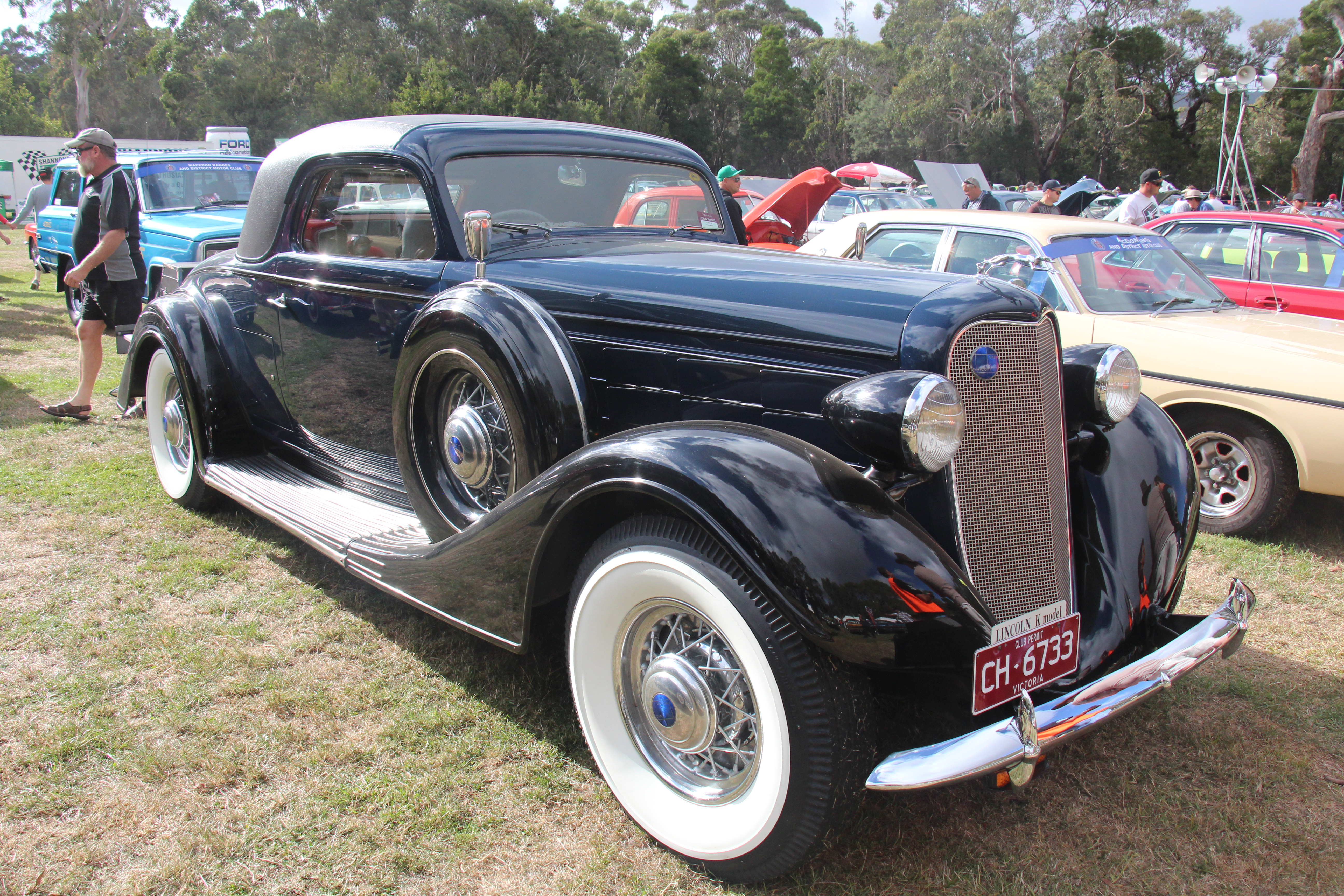 1934 Lincoln Model KB Coupe